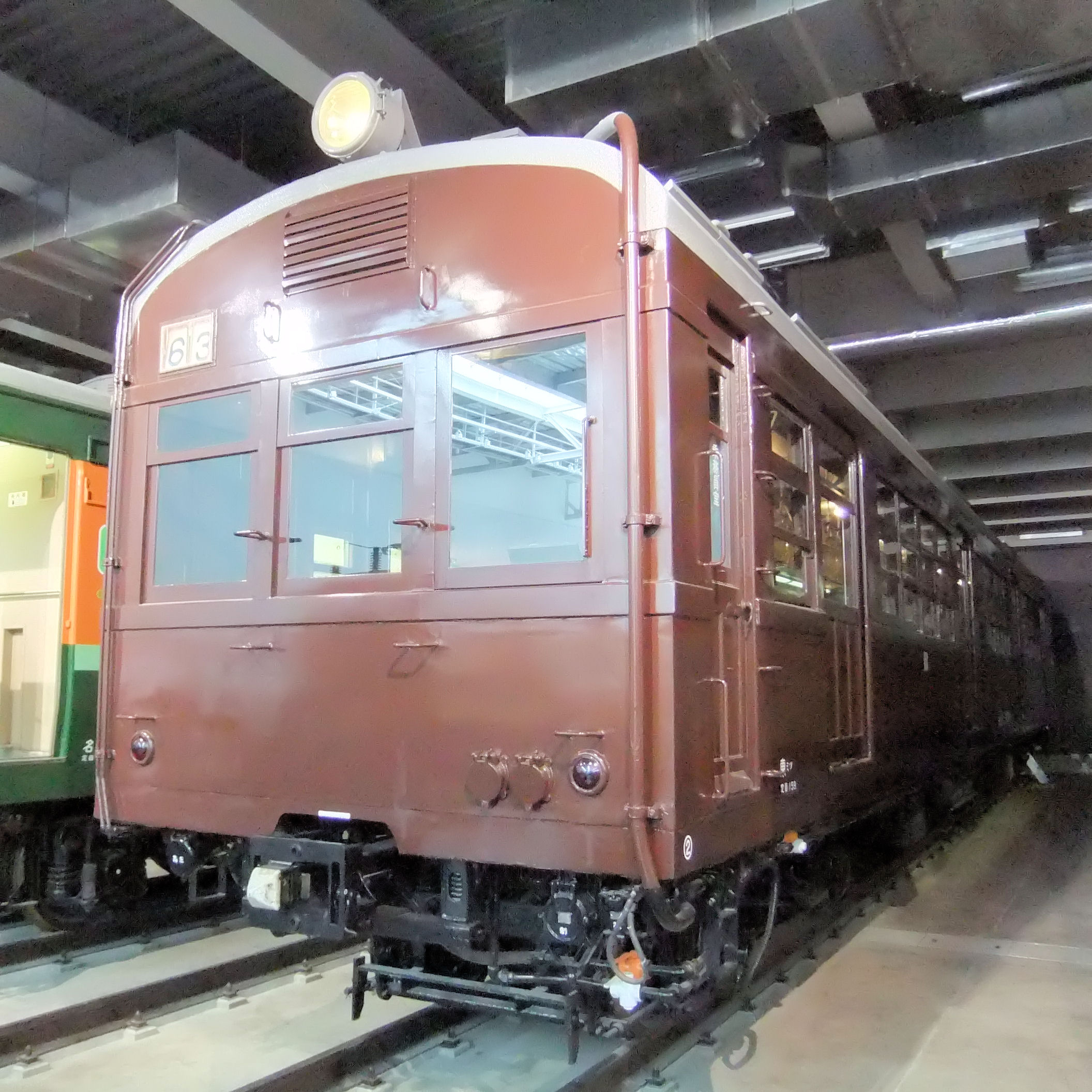 モハ63形63638号（リニア・鉄道館にて）